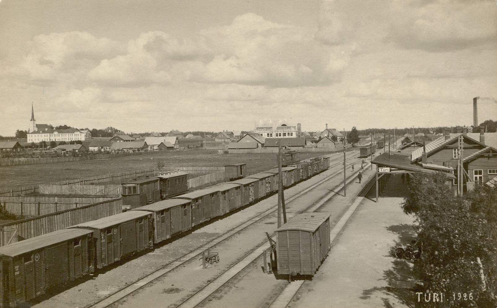 Türi raudteejaam